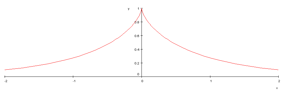 tractrix